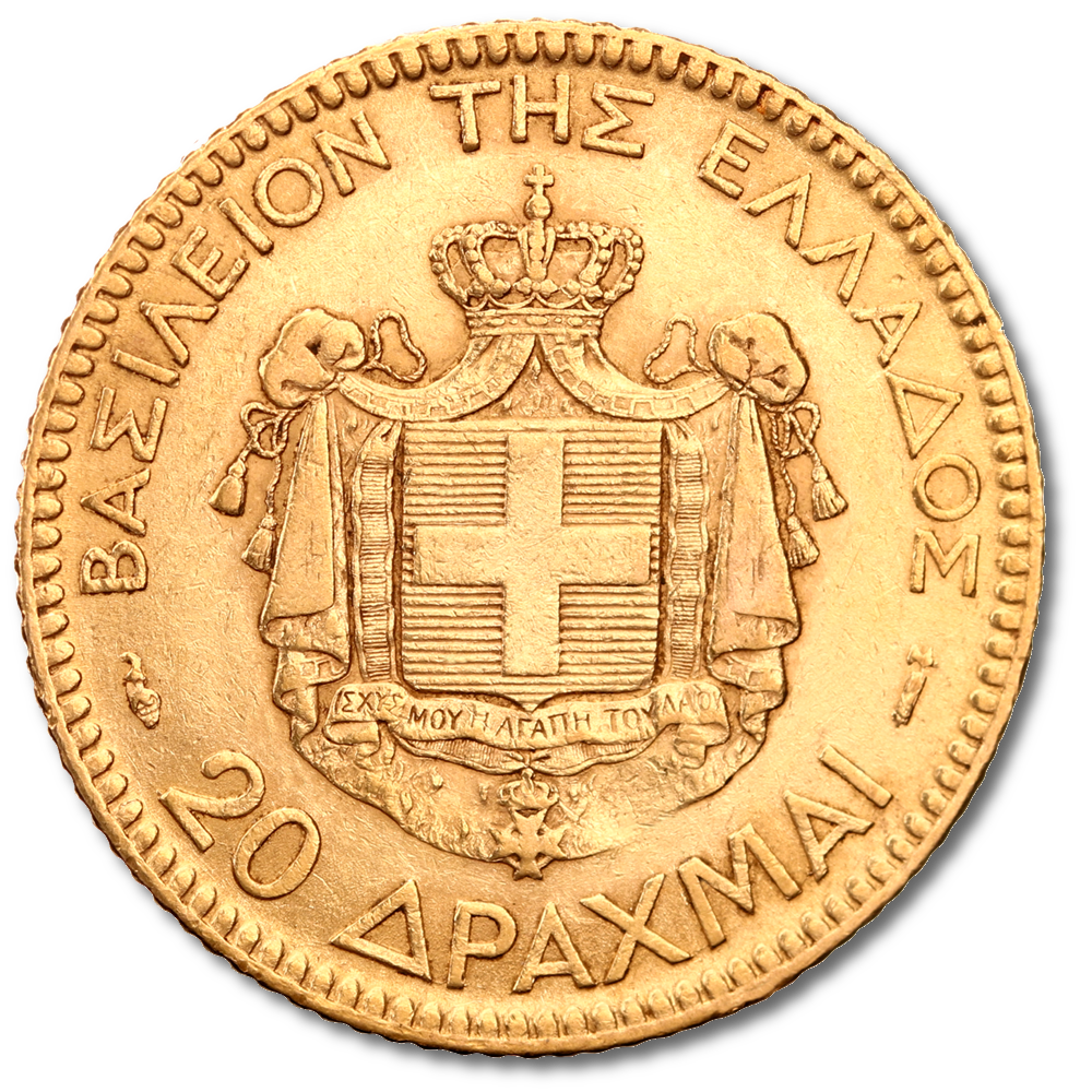 Wertseite der 20 Drachmen Goldmünze.